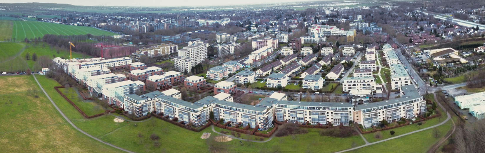 Der Stadtteil Weiden befindet sich im Nordwesten von Köln, genau genommen am nordwestlichen Teil des Autobahnkreuzes Köln-West. Hier abgebildet das Neubaugebiet an der Kronstädter Straße. Aufnahme mit einer Fotoldrohne von Süden aus.